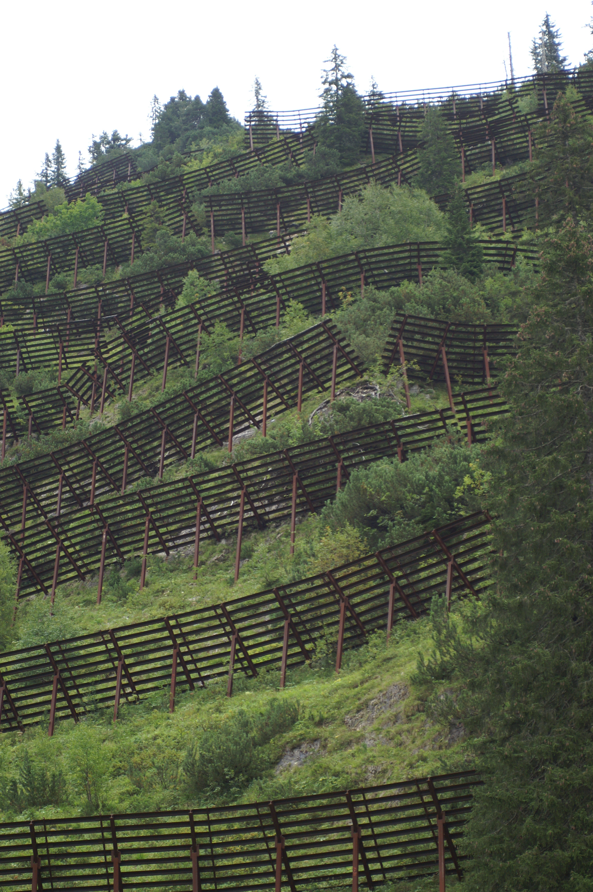 Stahlschneebrücken (Lawinenfangzäune) an der Bregenzerwaldstrasse zum Hochtannbergpass im Bregenzerwald , Vorarlberg